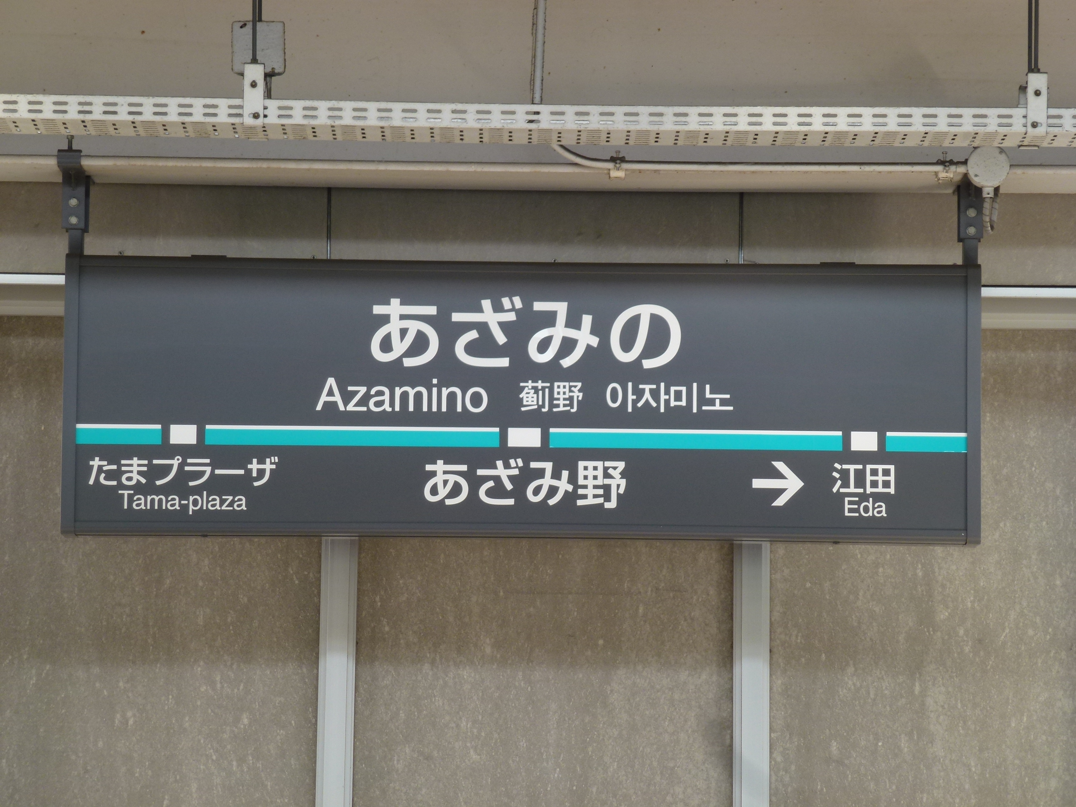 東急田園都市線あざみ野駅前駅名標。前デザインの駅名表は通常赤帯であったが、緑帯に駅ナンバリングの現デザインの駅名標への過渡期にはこのようなものも見られた。